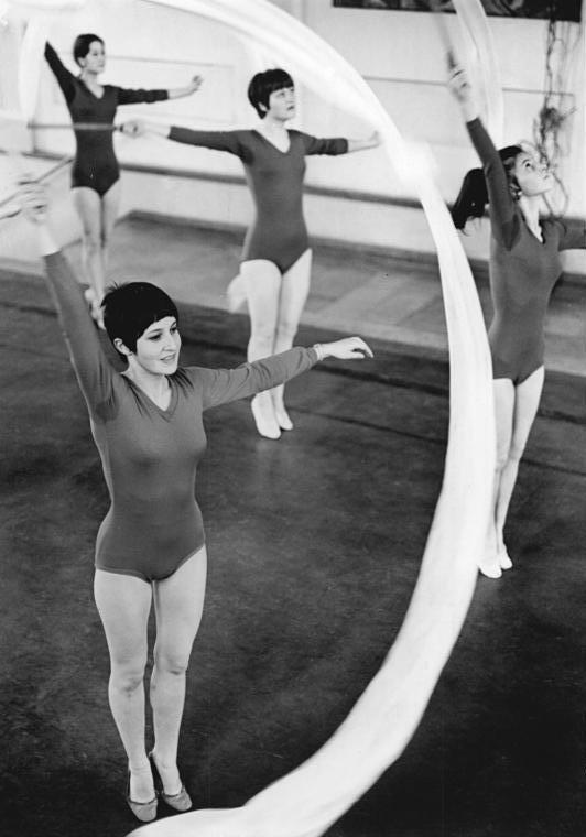 Erfurt, Pädagogische Hochschule, Turngruppe Zentralbild Demme 30-6-70 Erfurt: Studenten treiben regelmäßig Sport - Mehr als 2.000 Direktstudenten der Pädagogischen Hochschule Erfurt treiben zweimal in der Woche Sport und erfüllen damit die Forderung des Turn- und Sporttages des DTSB nach mehrmaliger sportlicher Betätigung, um neue Kräfte für ein intensives Studium zu schöpfen. Die Gymnastikgruppe der Hochschulsportgemeinschaft studiert in ihrer Freizeit die neuesten Übungselemente der Künstlerischen Gymnastik ein. Mit viel Charme ist hier Rita Kunke (2. Studienjahr), die Deutsch und Kunstgeschichte studiert, bei der Sache.